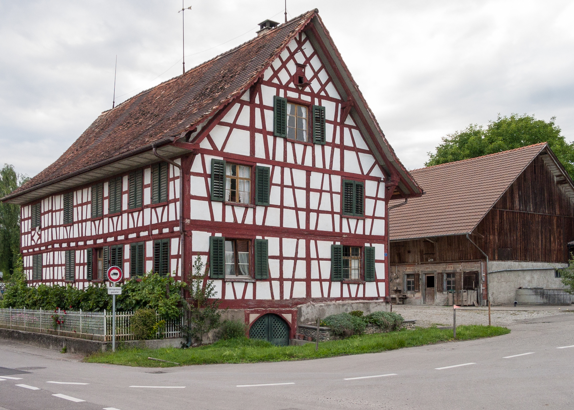 Bauernhaus Gunterswilerstr. 1 in Sonterswil